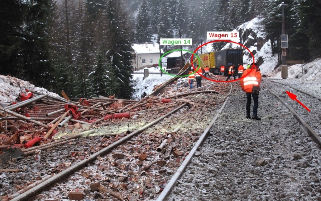 Letzte Wagen 15 und 14 sowie hinuntergeschleuderte Ladung links neben dem Gleis nach der Entgleisung bei Gries am Brenner